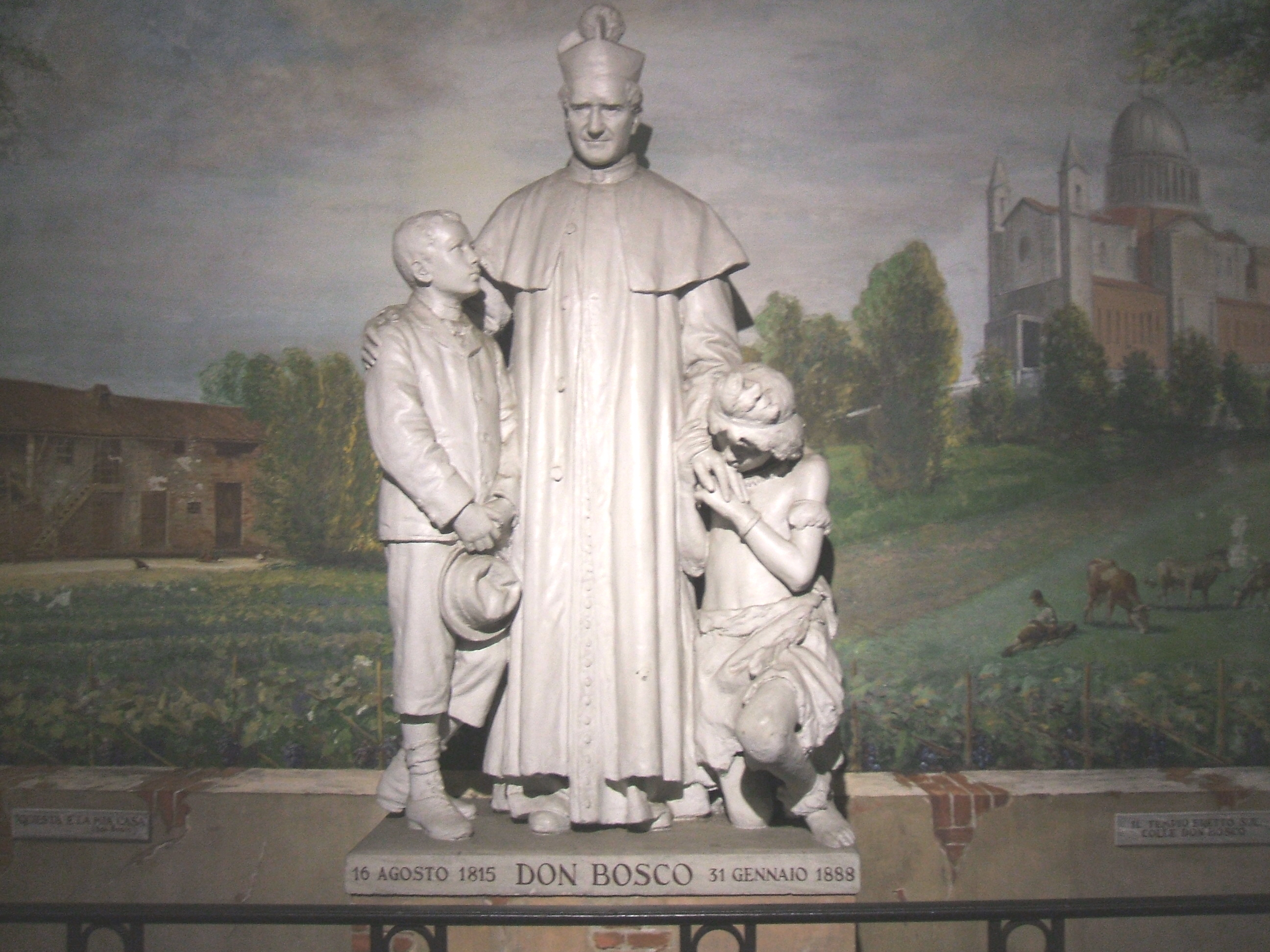 Statua di Giovanni Bosco, a Valdocco, Torino